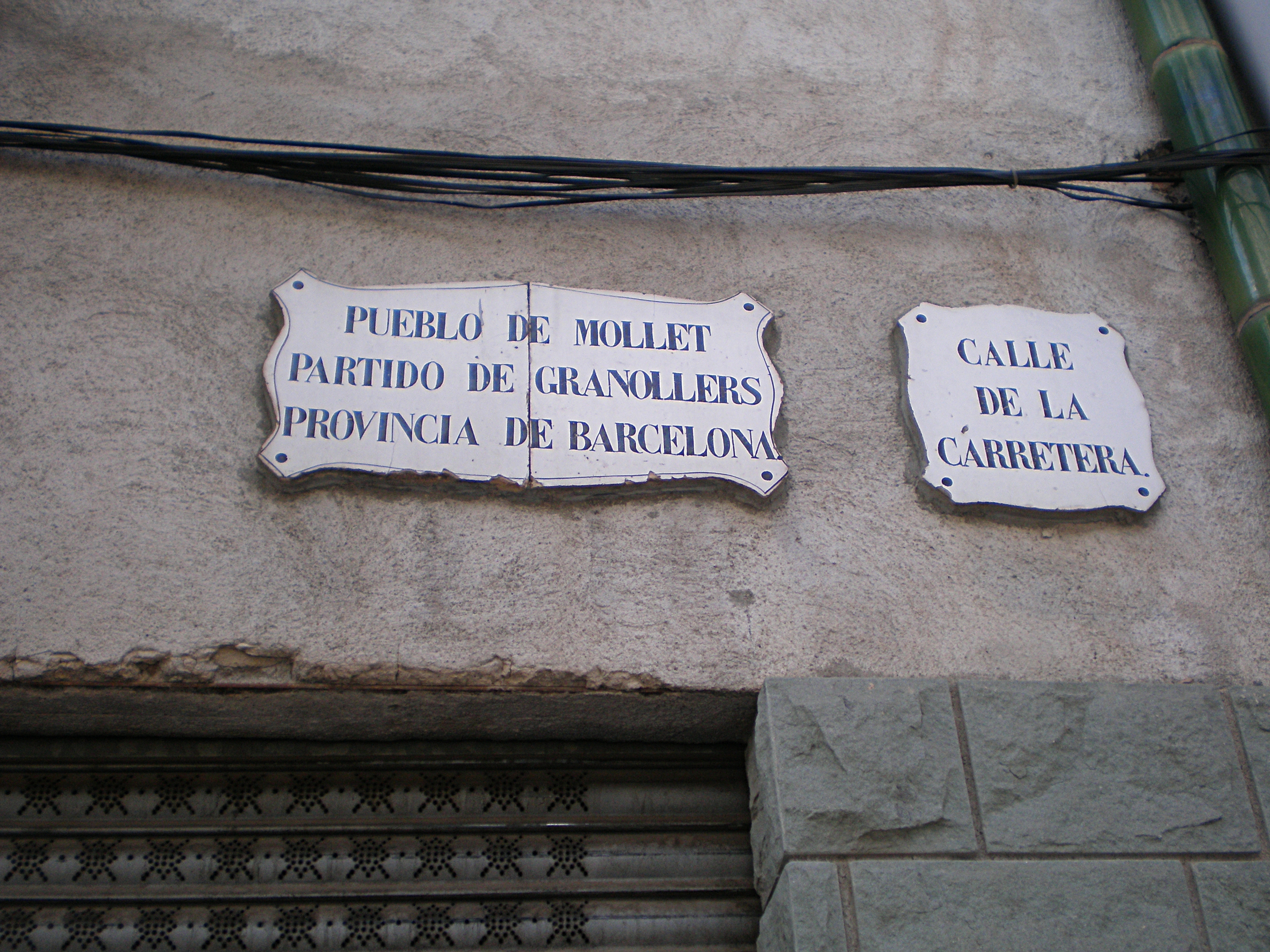 Mollet del Vallès: calle Jaume I.